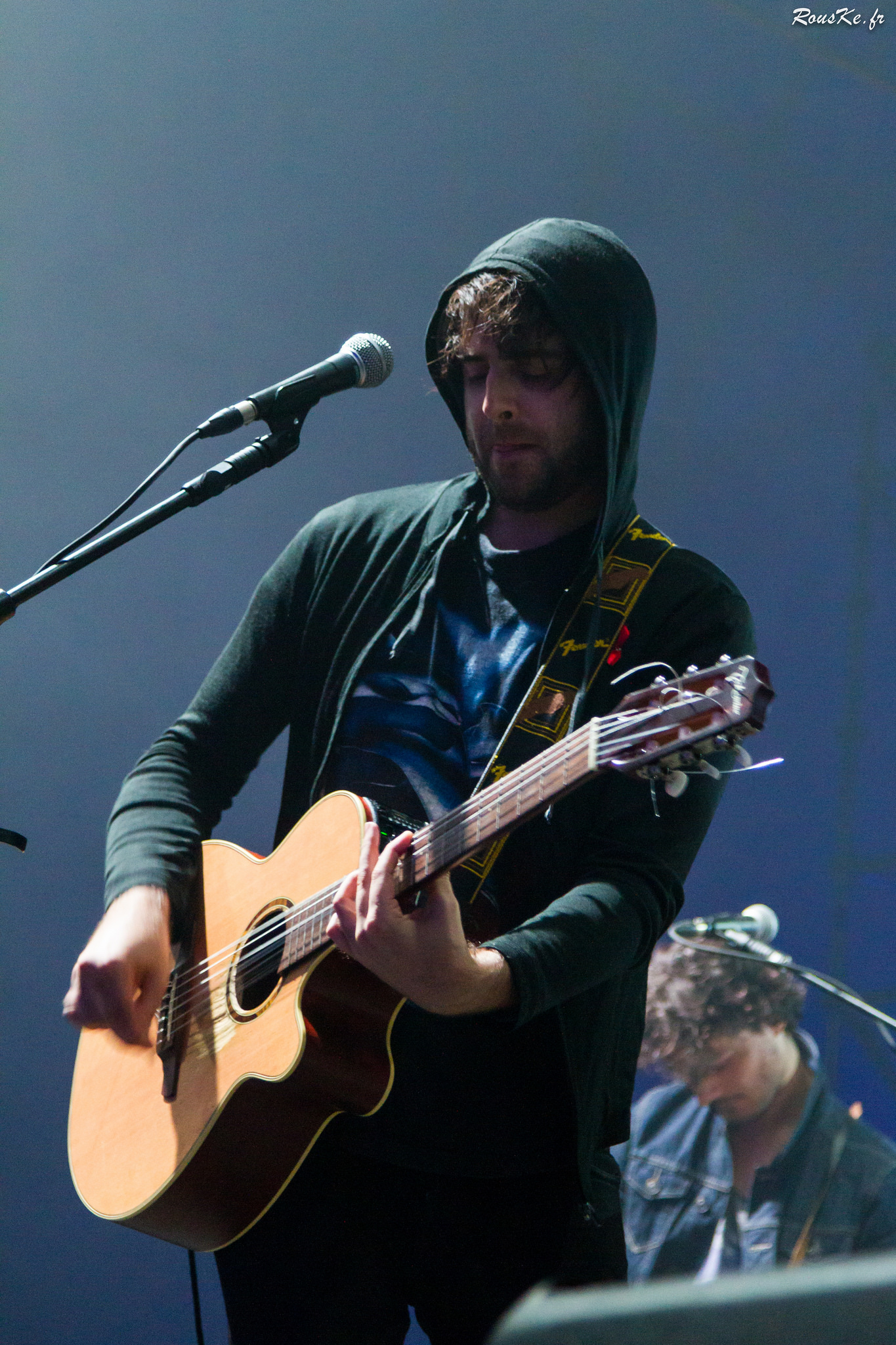 stuck in the sound solidays 2014